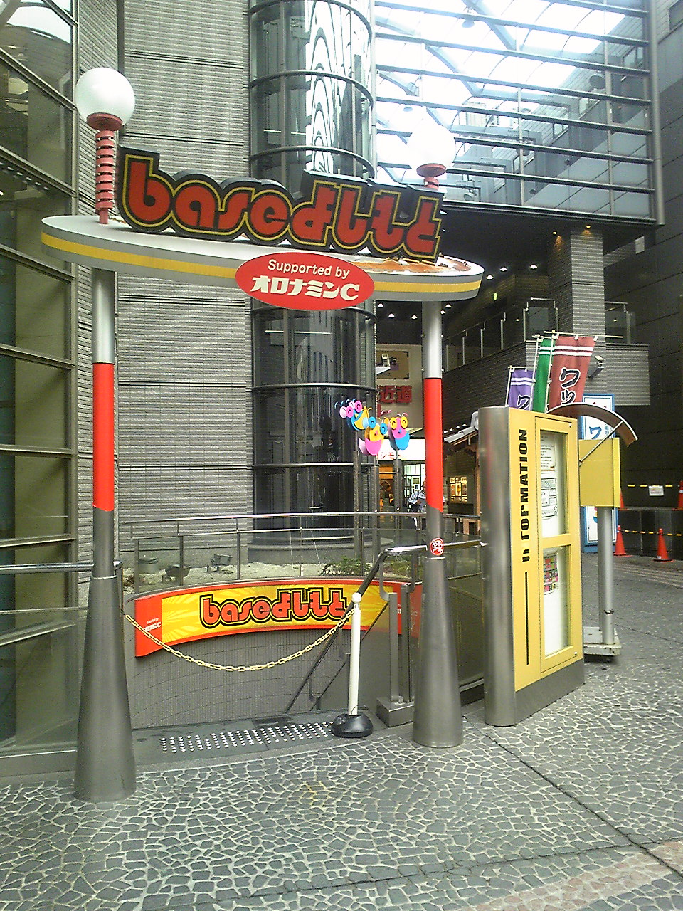 baseよしもとの入口